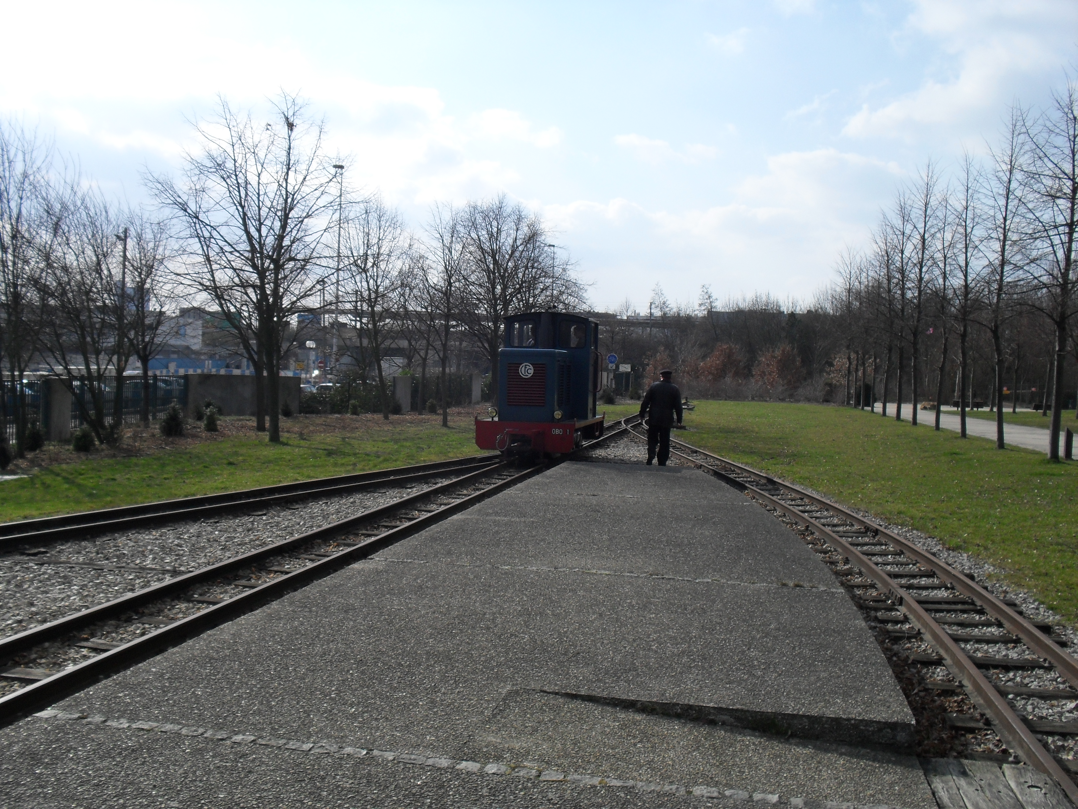 Locomotive en manoeuvre de retournement à la gare CFC des Tilliers RER